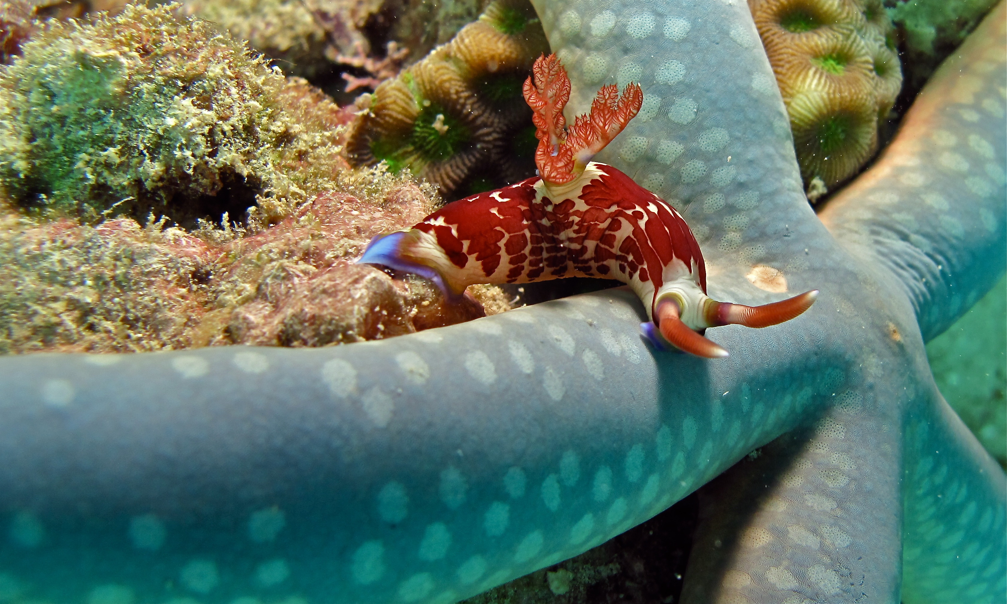 Eel Garden, Pulau Mabul, Sabah, MALAYSIA